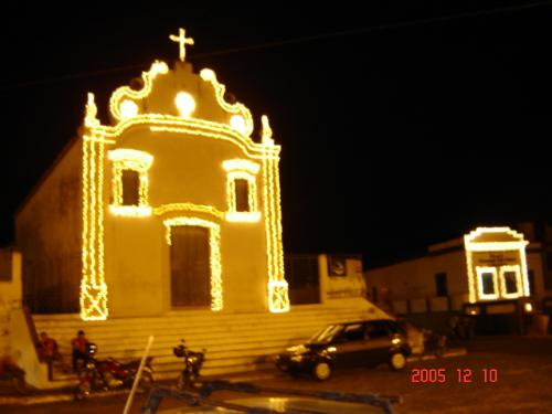 É uma imagem da Igreja de Nossa Senhora do Rosário, localizada em Acari- RN- Brasil.